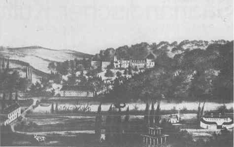 Niederwürzbach